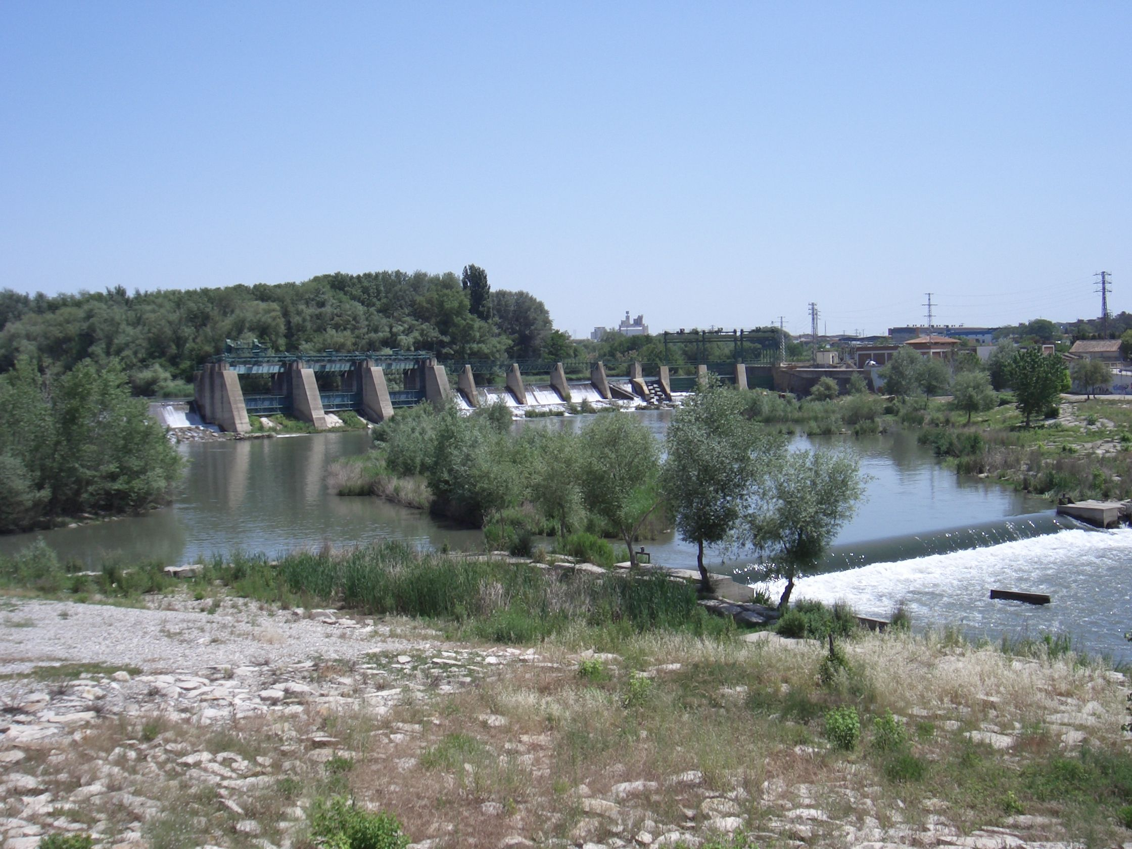 Comportes al riu Segre que marquen l'inici del Canal de Seros a la localitat de Lleida, (Catalonia/Spain).